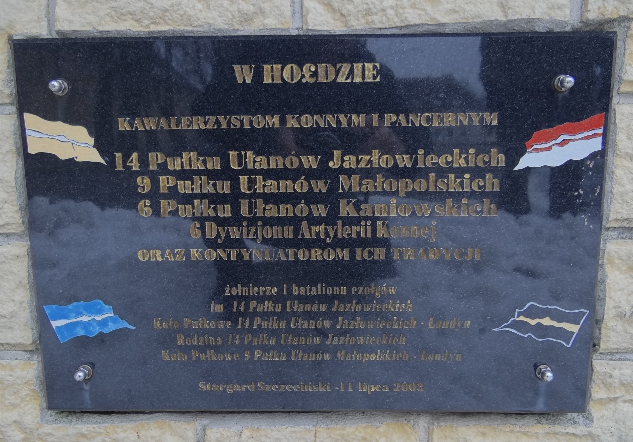 Tablica pamiątkowa upamiętniająca kawalerzystów konnych i pancernych - białe koszary